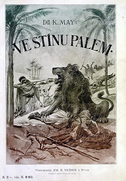 České vydání knihy Karla Maye Ve stínu palem z roku 1903 s obálkou od Josefa Ulricha